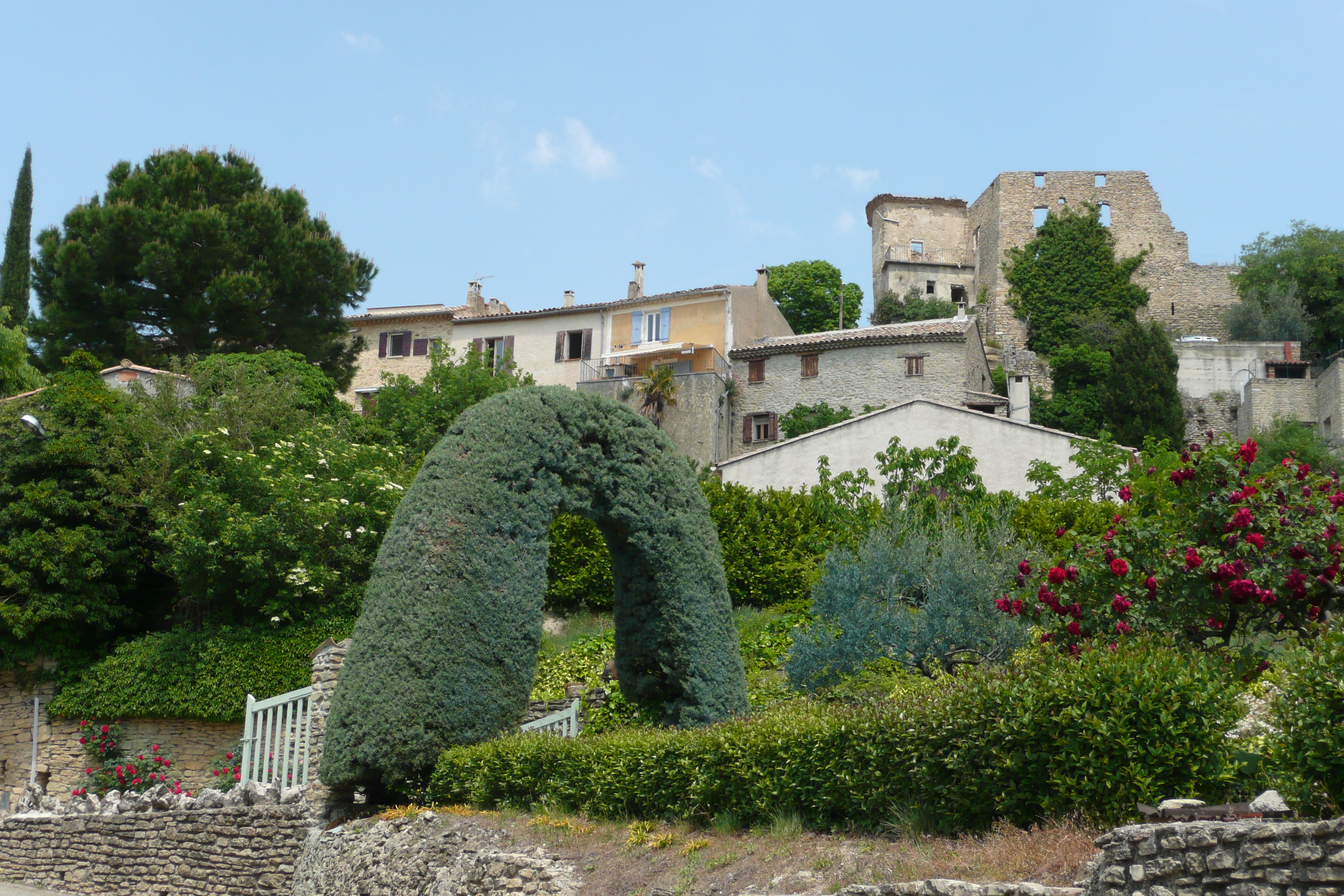 Faucon (Vaucluse).